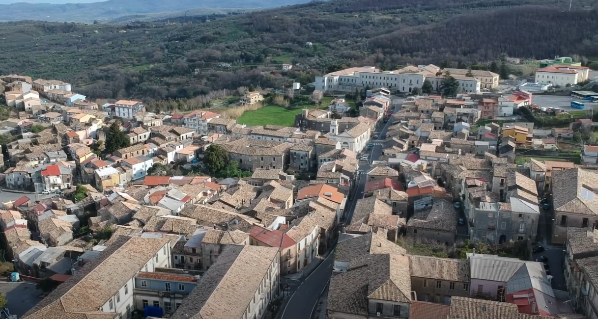 Vista sul centro storico di Girifalco dall'alto attraversato da corso Garibaldi dalla piazza Umberto I alla piazza Vittorio Emanuele II con il complesso monumentale in fondo e il rione pioppi vecchi sulla estrema sinistra.